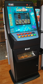 jokeripokeri